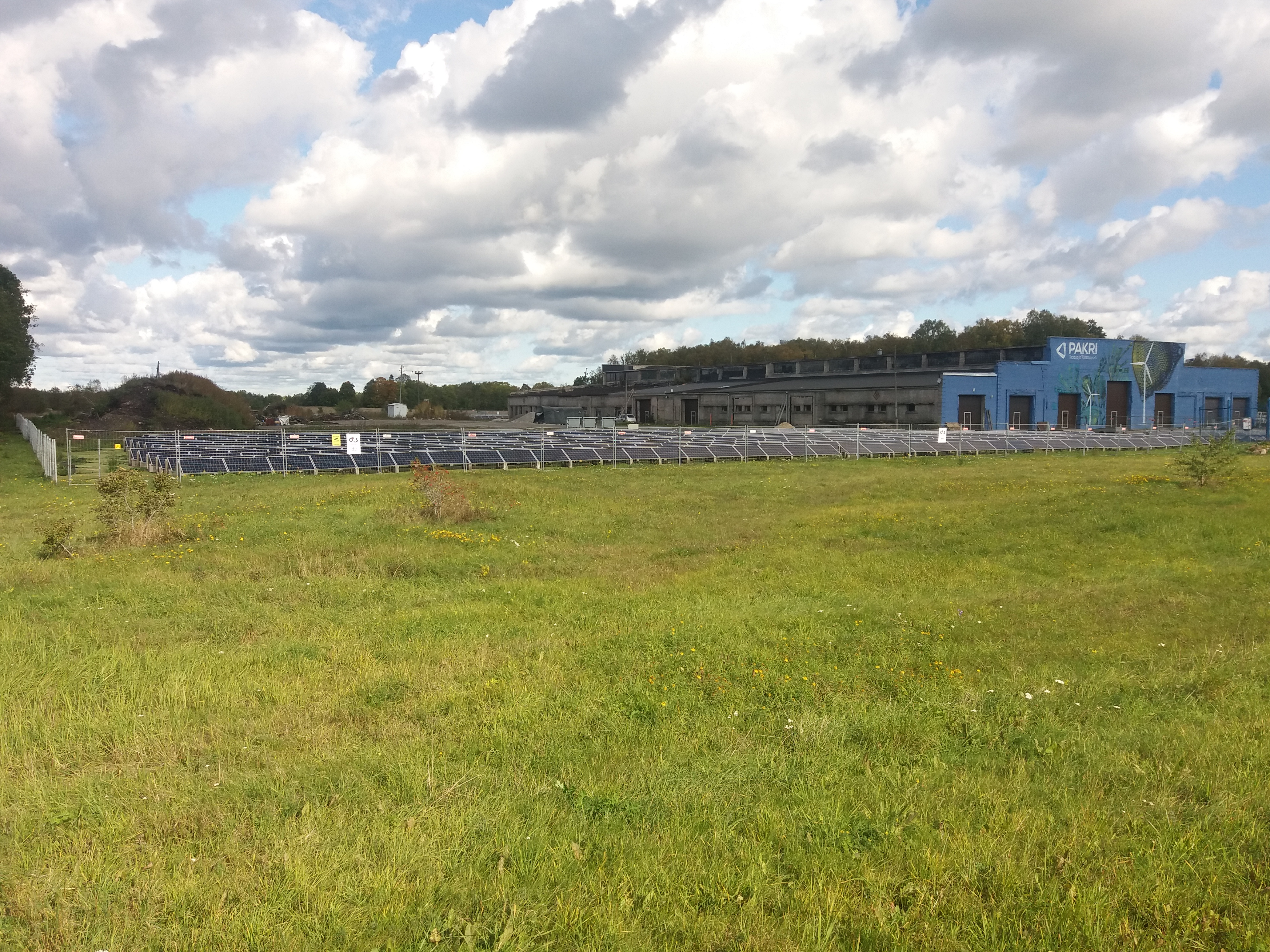 Pakri päikeseelektrijaam